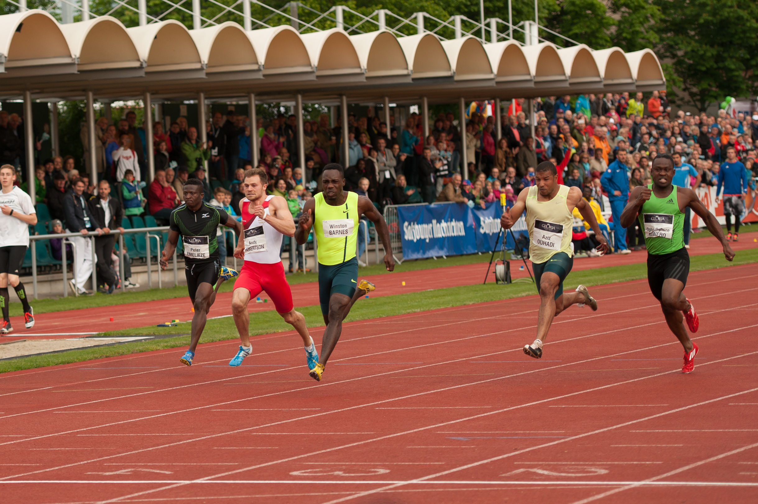 Salzburger Leichtathletik Gala am 27. Mai 2015: Winston Barnes